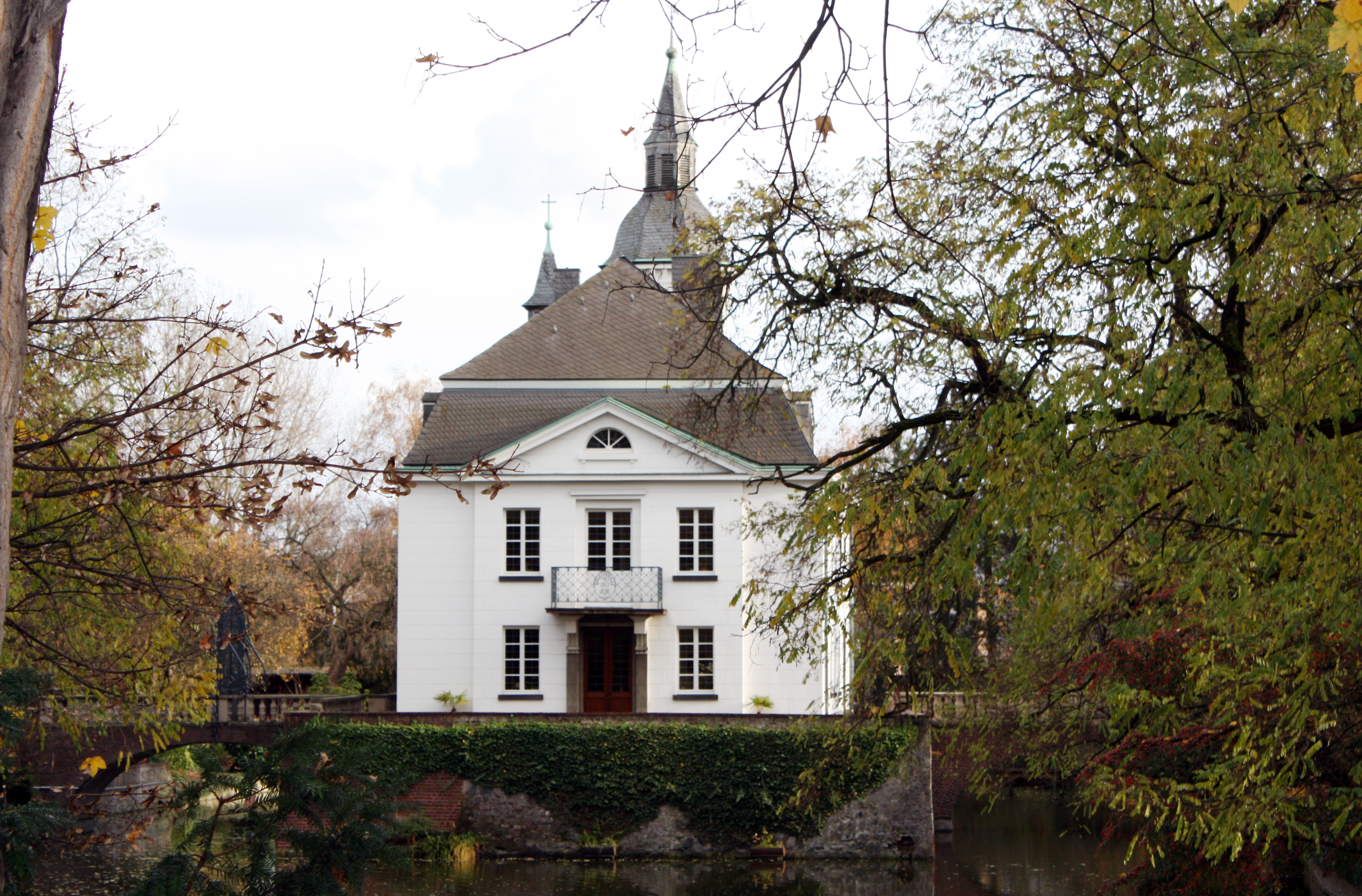 Wasserschloss Weißhaus, Köln